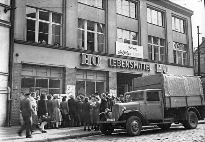 Berlin, Köpenick, HO-Lebensmittelgeschäft Illus Richter 17.10.50 Berlin-Köpenick - Köpenick, ein Ort an der Mündung von Dahme und Spree östlich von Berlin, wurde 1920 der 16.Verwaltungsbezirk Gross-Berlin. Die Hauptindustrie sind chemische Fabriken und Wäschereien UBz: Für das leibliche Wohl der Köpenicker sorgt die H.O., die ein grosses Lebensmittelgeschäft eröffnete.